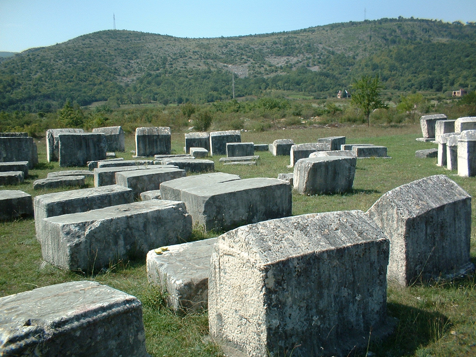 Esta es una foto donde se muestra un cementerio bogomilo, esta tomada en Bosnia i Herzegobina